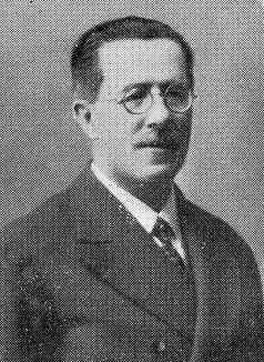 Manuel Becerra Fernández, fotografía en Vida Gallega 1932